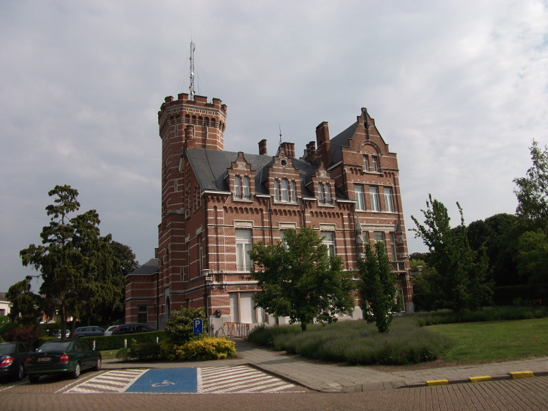 Oud politiebureel van Schoten (België)